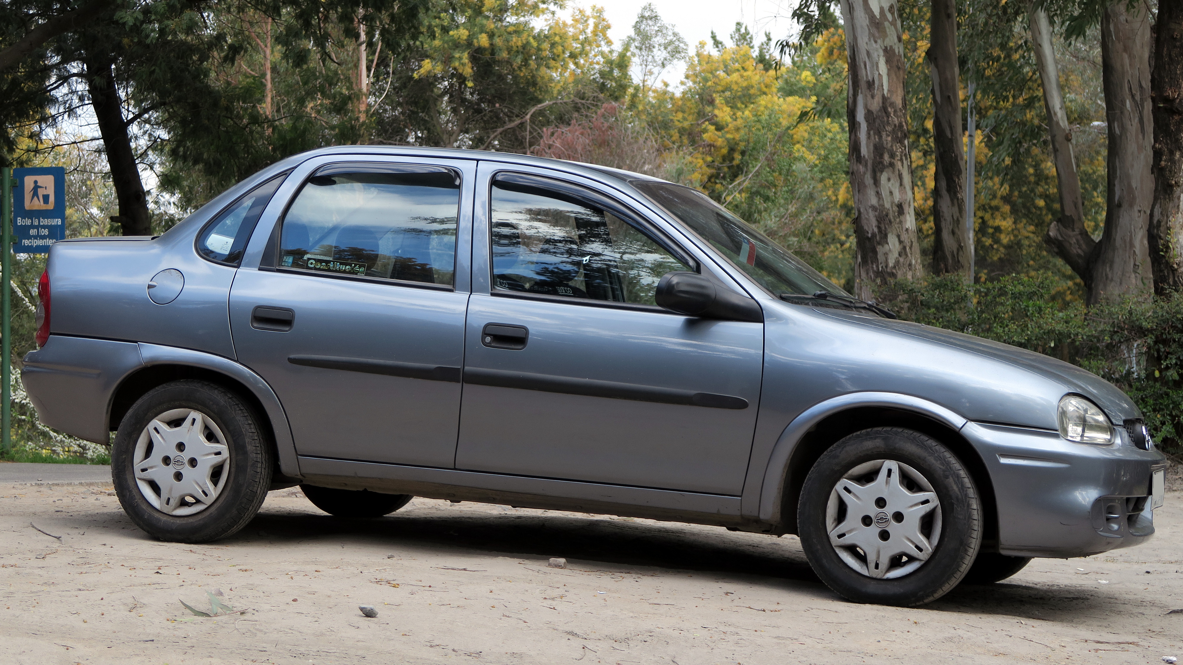 Chevrolet Corsa Classic GL Extra Millennium 2002